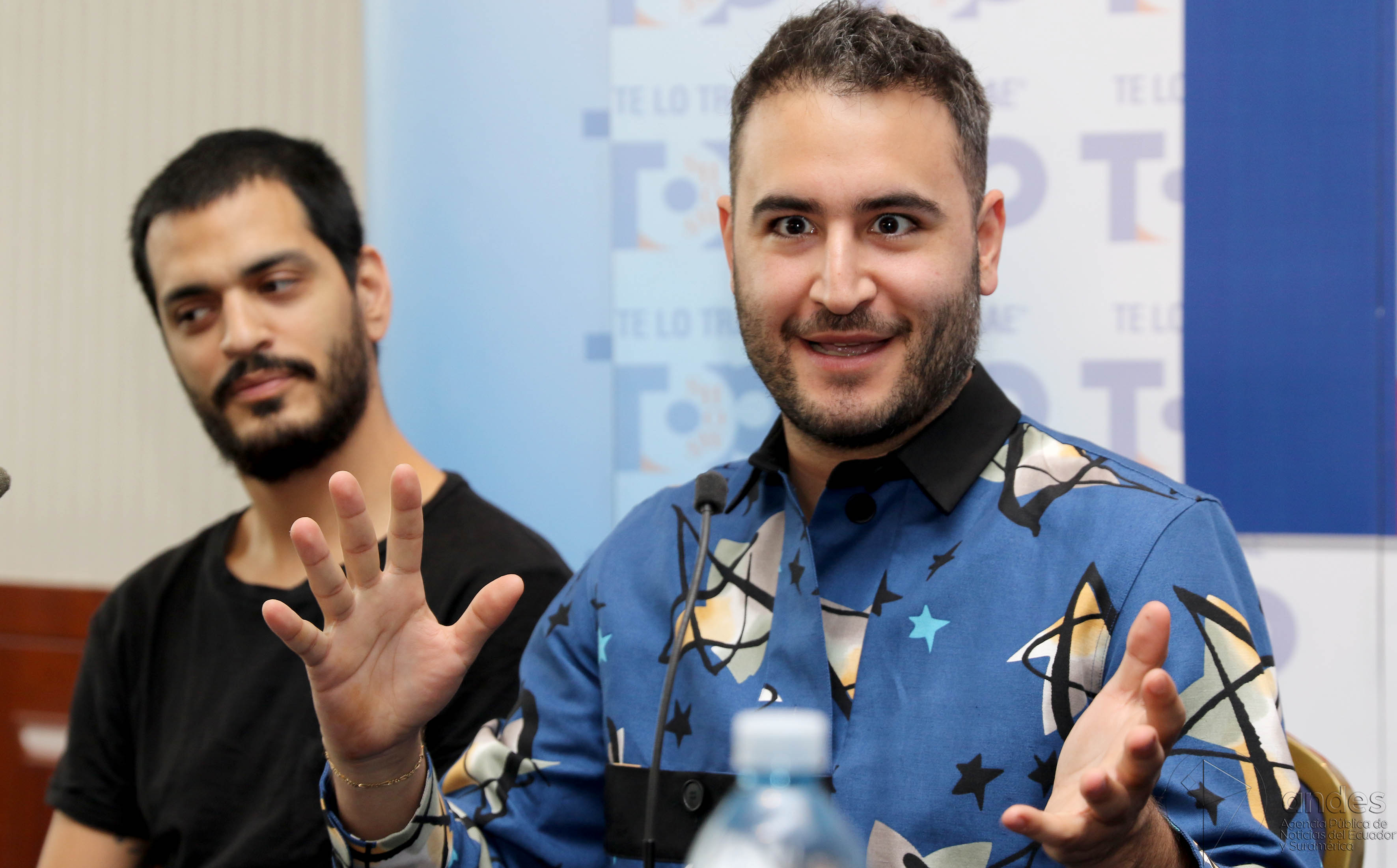 Guayaquil, jueves 02 de febrero del 2017 (Andes).-La banda mexicana Reik ofrecerá dos conciertos en Ecuador junto al español Melendi. Foto:Andes/César Muñoz